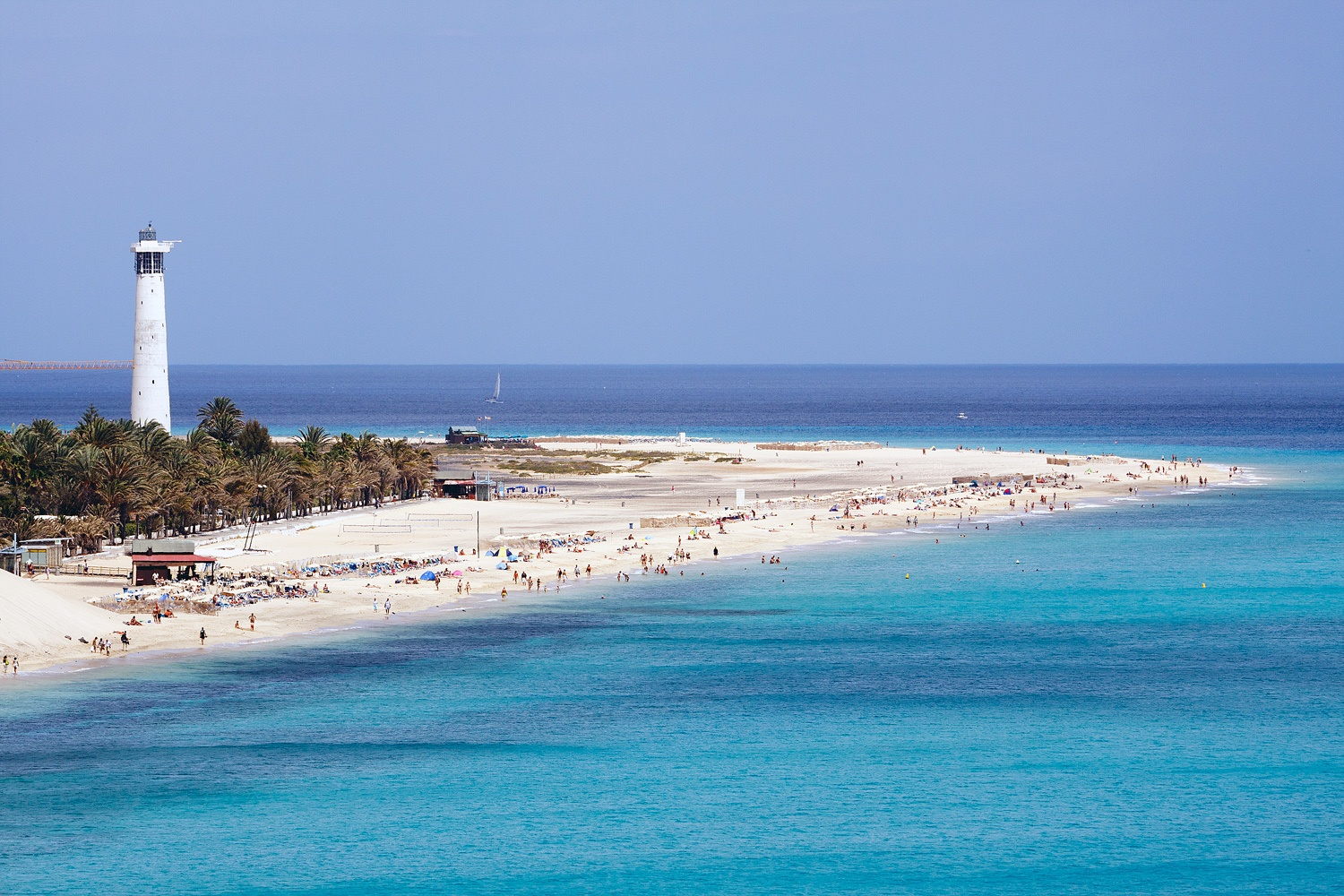 Halbinsel Jandia, Fuerteventura, Kanarische Inseln, Spanien, Datum/Uhrzeit: 05.06.2011 15:43:47